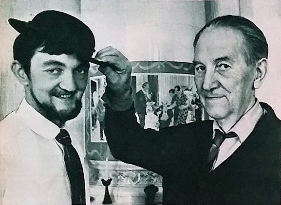 Serieskaparna Gunnar Persson och Elov Persson i samband med att Gunnar övertog faderns serie Kronblom. Bildtext i Året Runt 1968:22 (s. 34): "Kronbloms hatt passar ju grabben riktigt bra, säger Elov Persson, som ritat Kronblom i över 40 år. Sonen skall nu trampa i pappas fotspår."